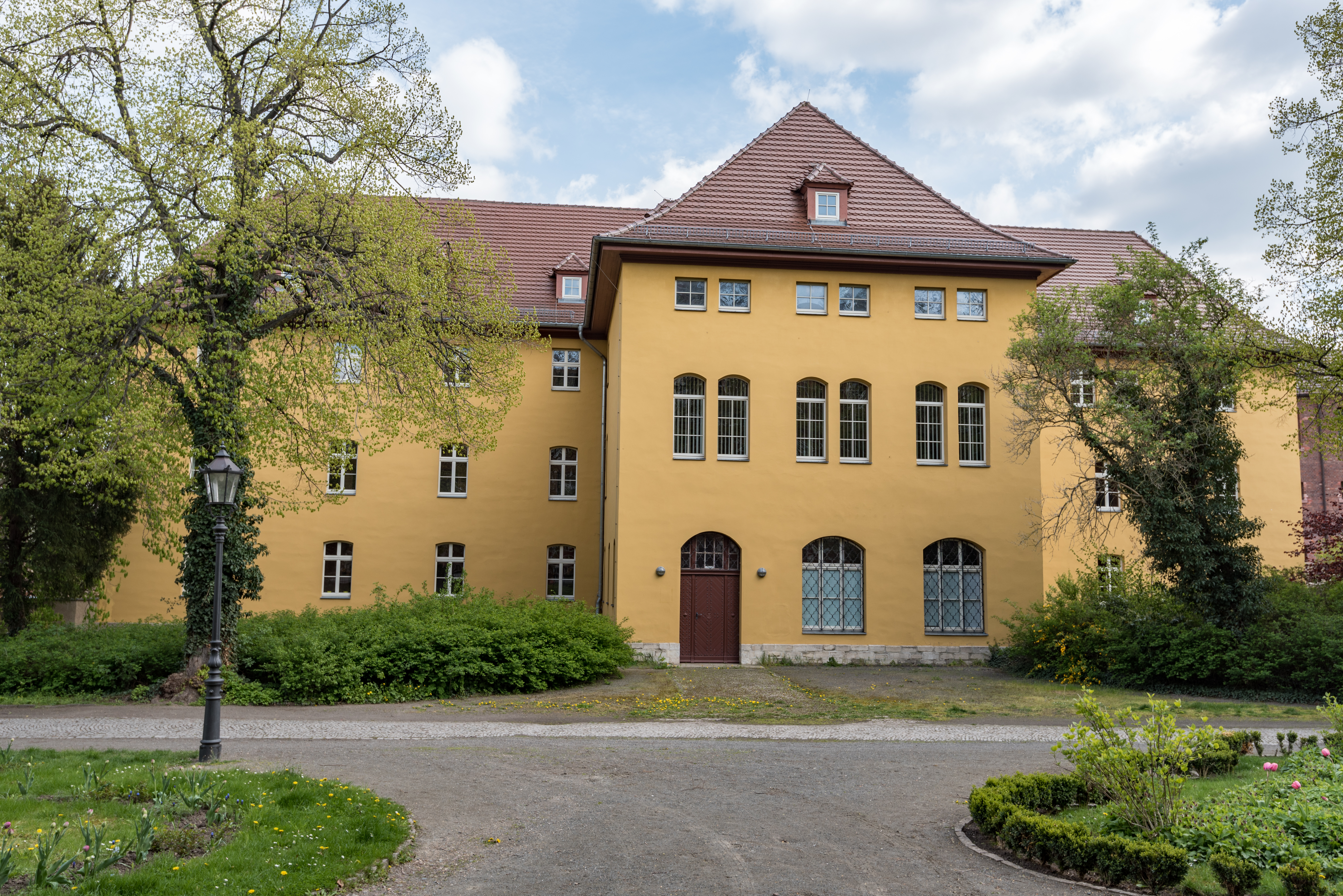 Aschersleben, Burgplatz 3